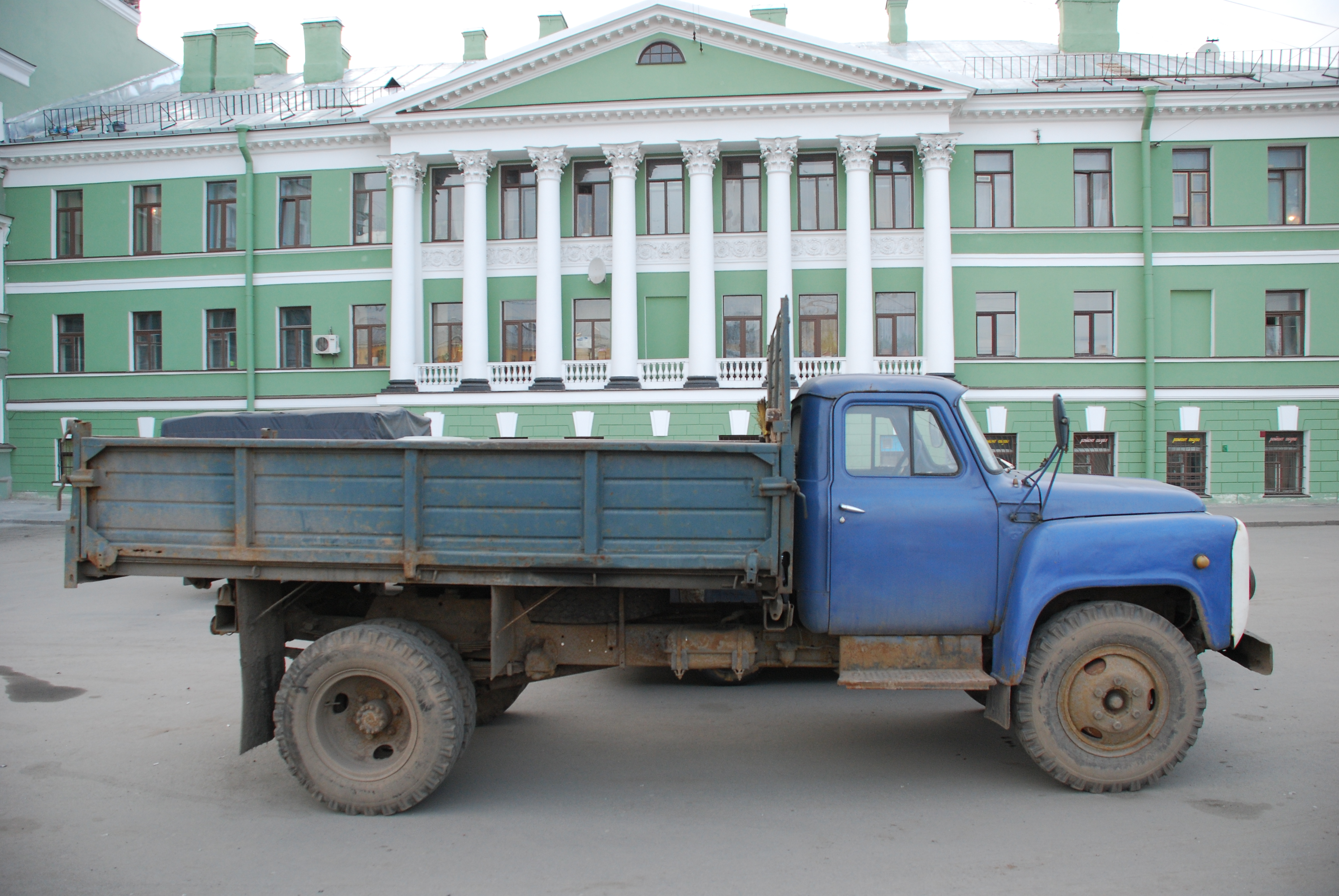 автомобиль ГАЗ 52 (GAZ 52 truck)